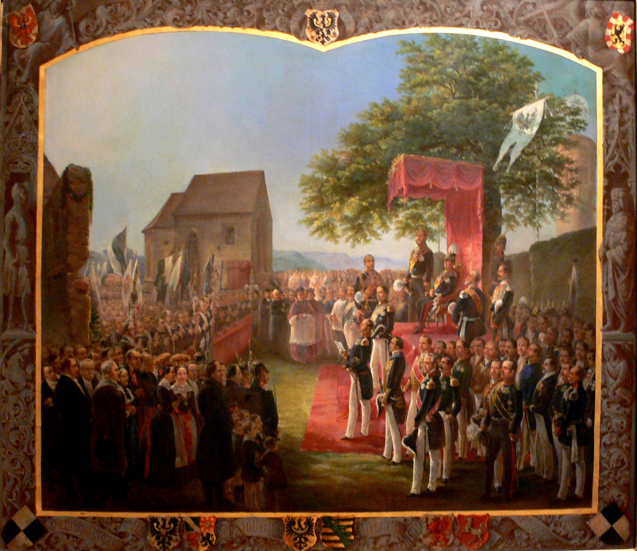 Erbhuldigung auf dem Hohenzollern am 23. August 1851 Der preußische König Friedrich Wilhelm IV. lässt sich auf der ehemaligen Stammburg Hohenzollern von seinen neuen schwäbischen Untertanen huldigen Öl auf Leinwand, 148 x 173,5 cm (mit Rahmen). Haus der Geschichte Baden-Württemberg